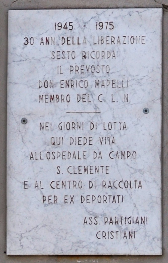 Lapide via cavour 14 Sesto San Giovanni